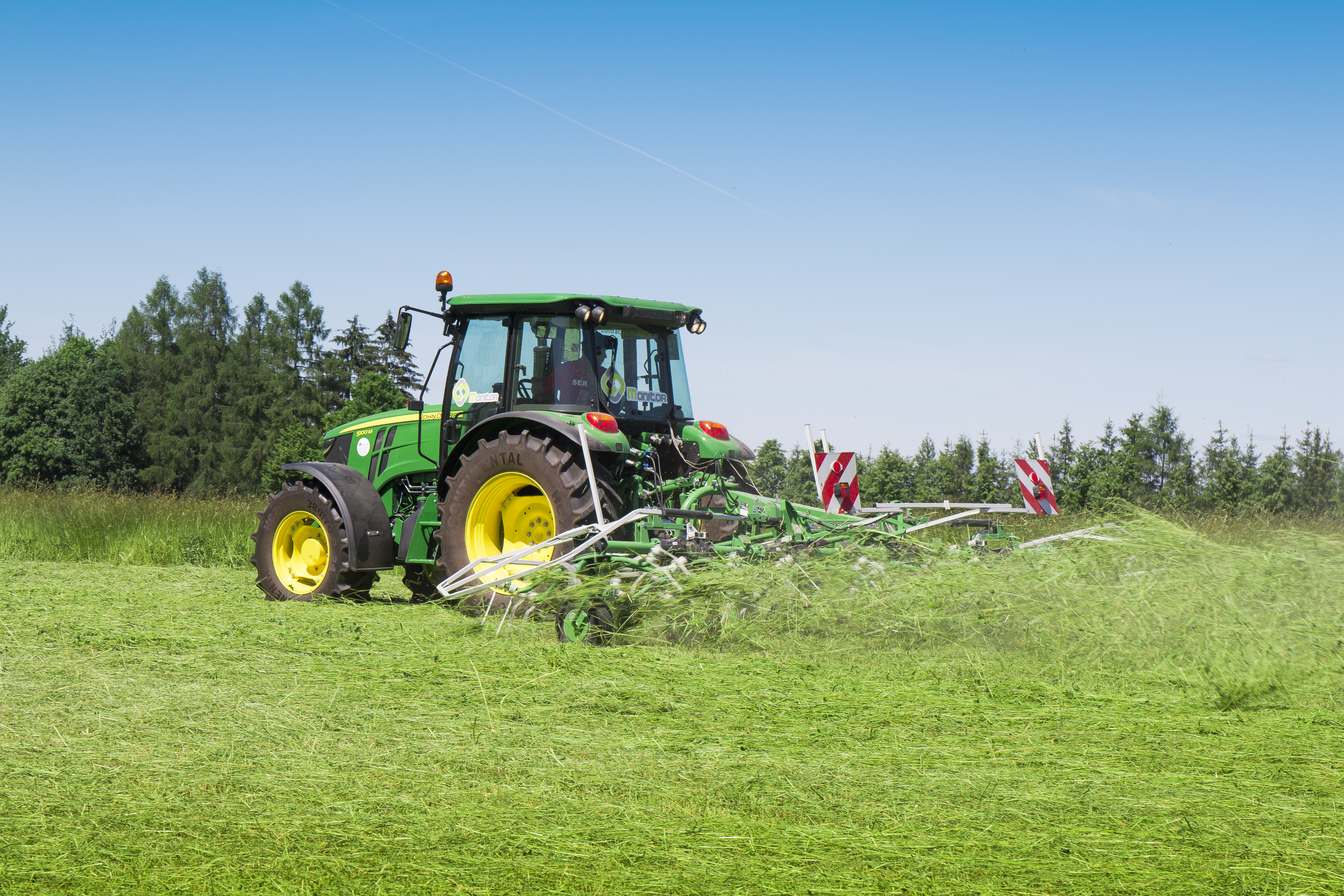 Przetrząsacz 6-karuzelowy SaMASZ P6-650 o szerokości roboczej 6,6 m